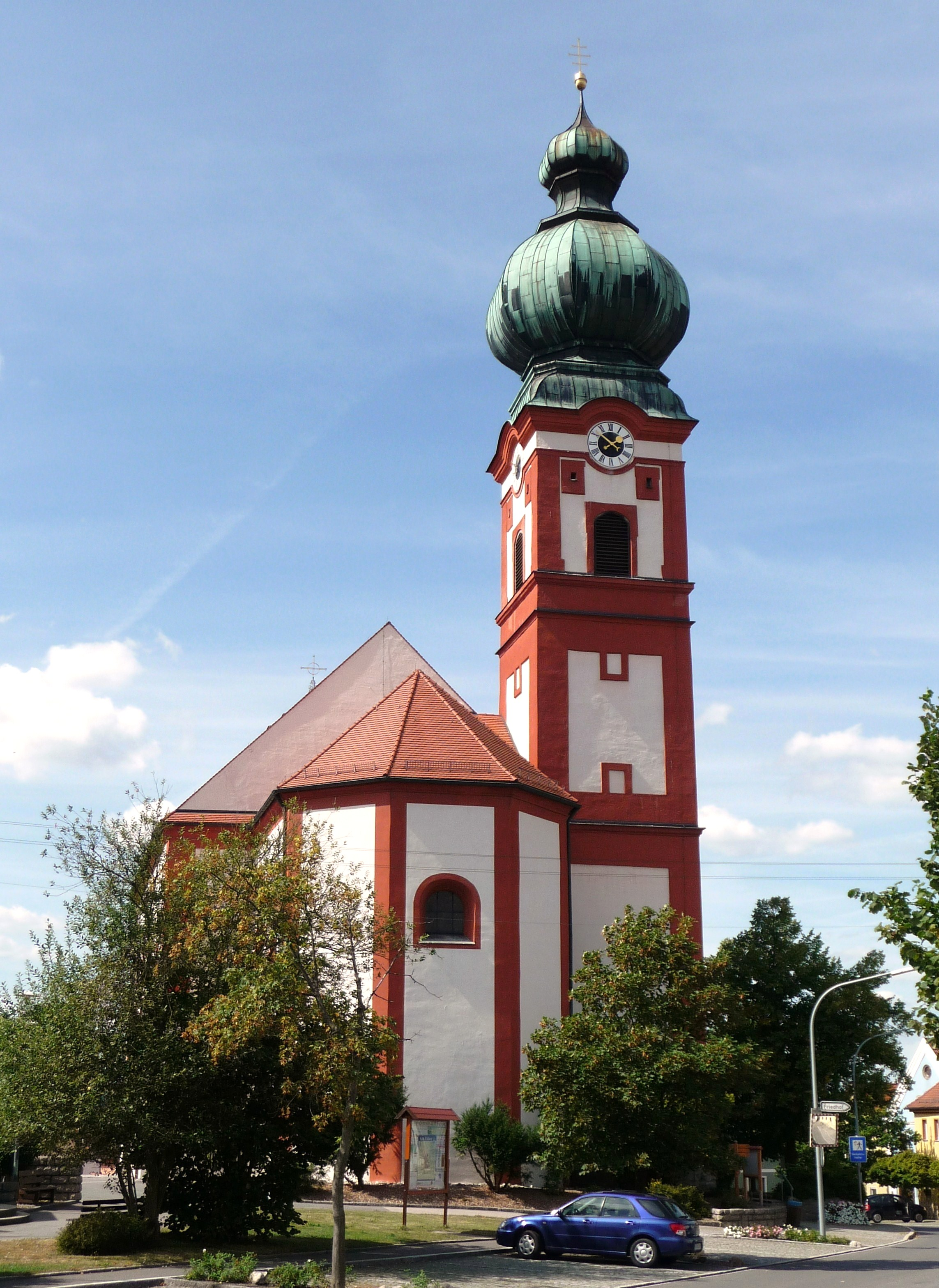 Die katholische Pfarrkirche Mariä Himmelfahrt in Eslarn